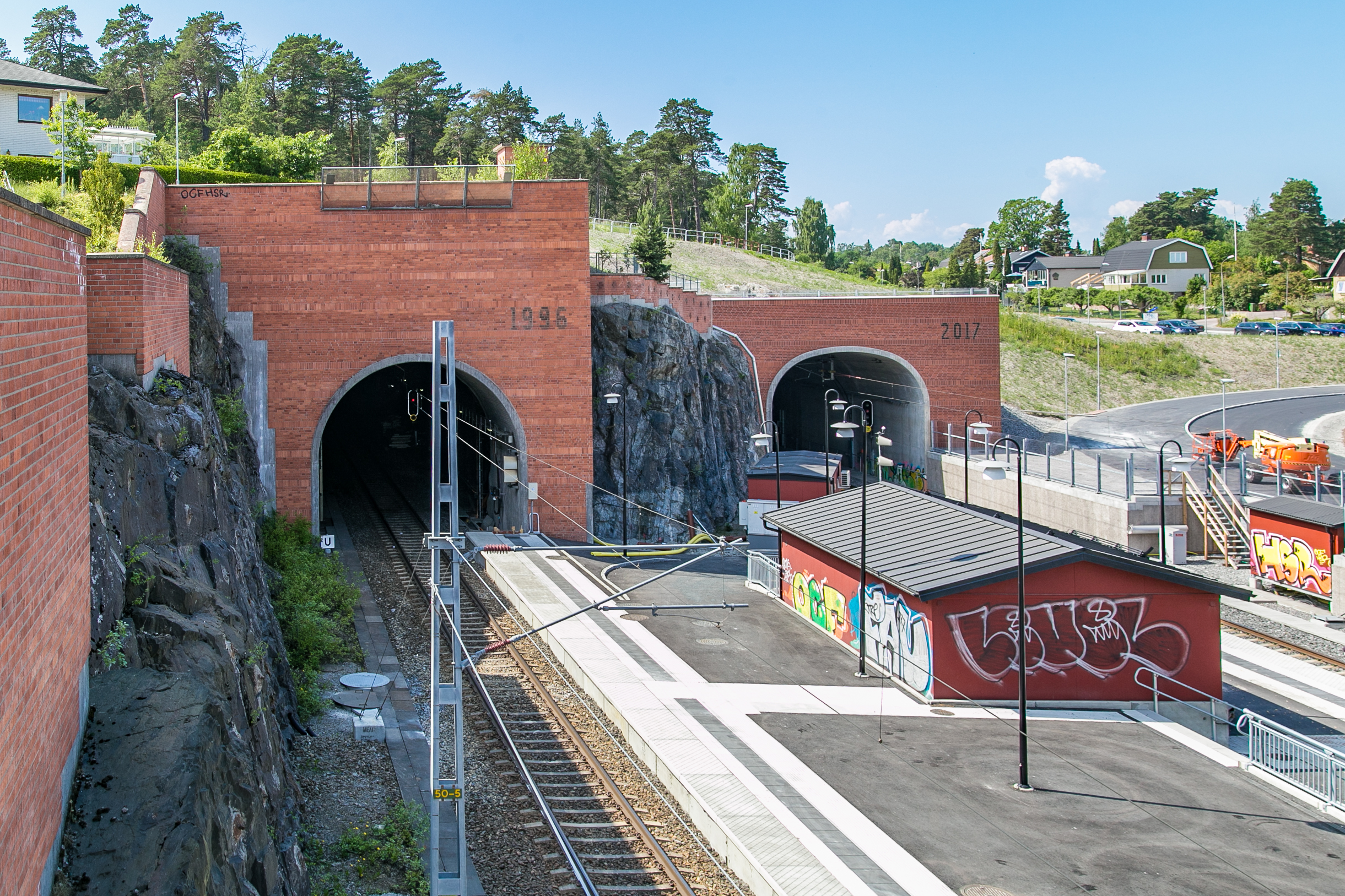 Strängnästunneln, Strängnäs, Södermanlands län, Sverige.